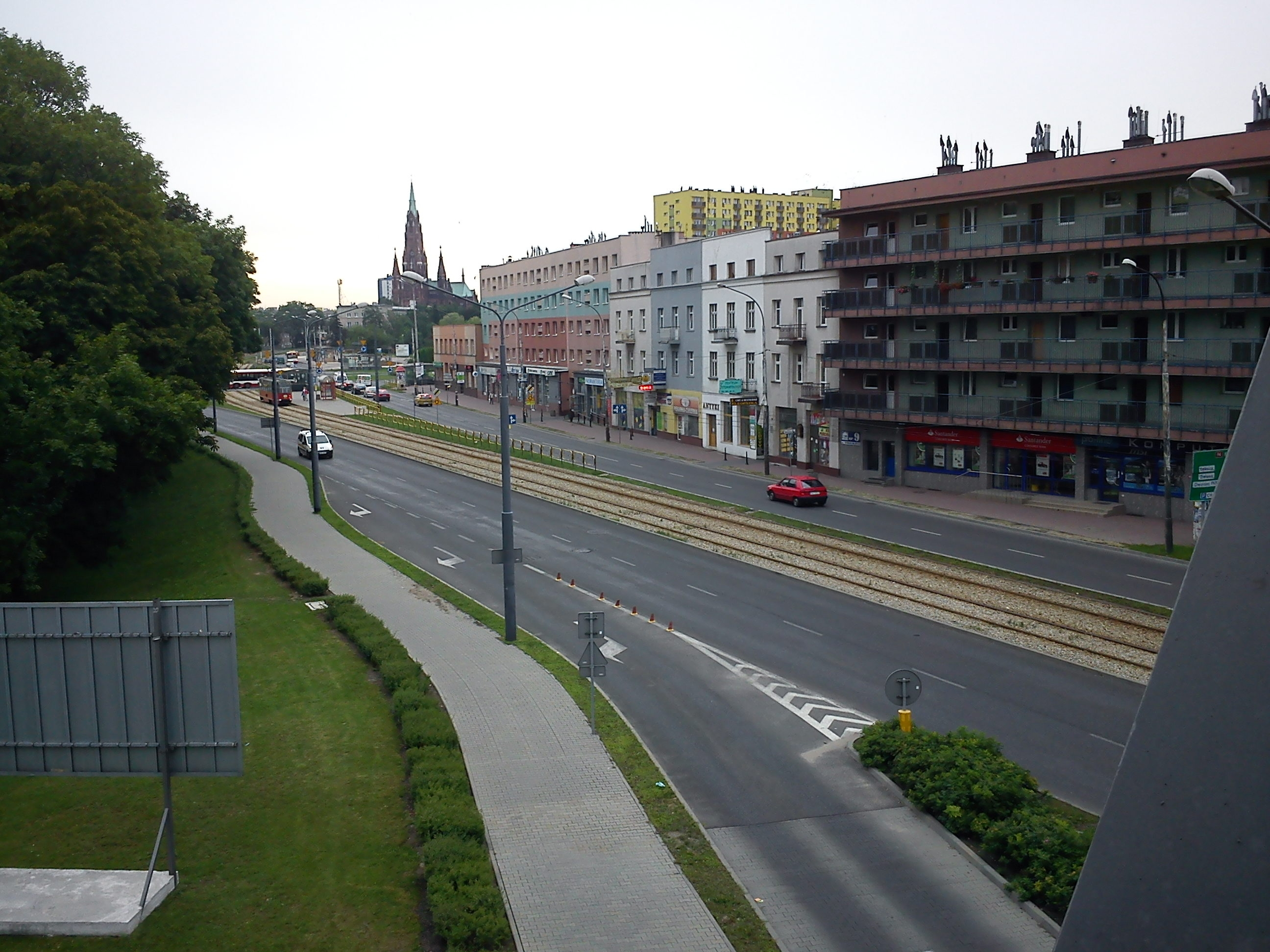 Dąbrowa Górnicza-Ulica Jana III Sobieskiego.